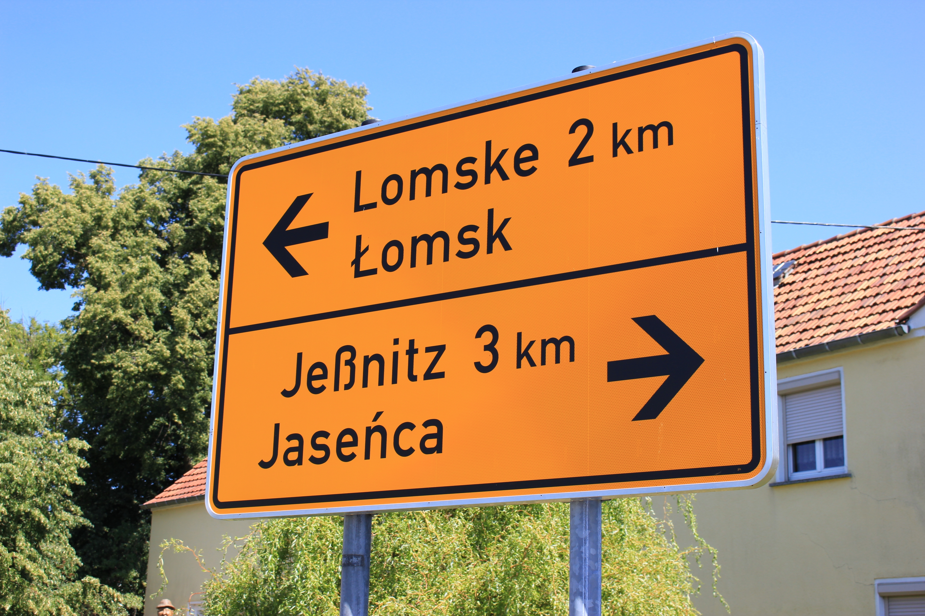 Hornjoserbsce: Pućnik w Dobrošicach.